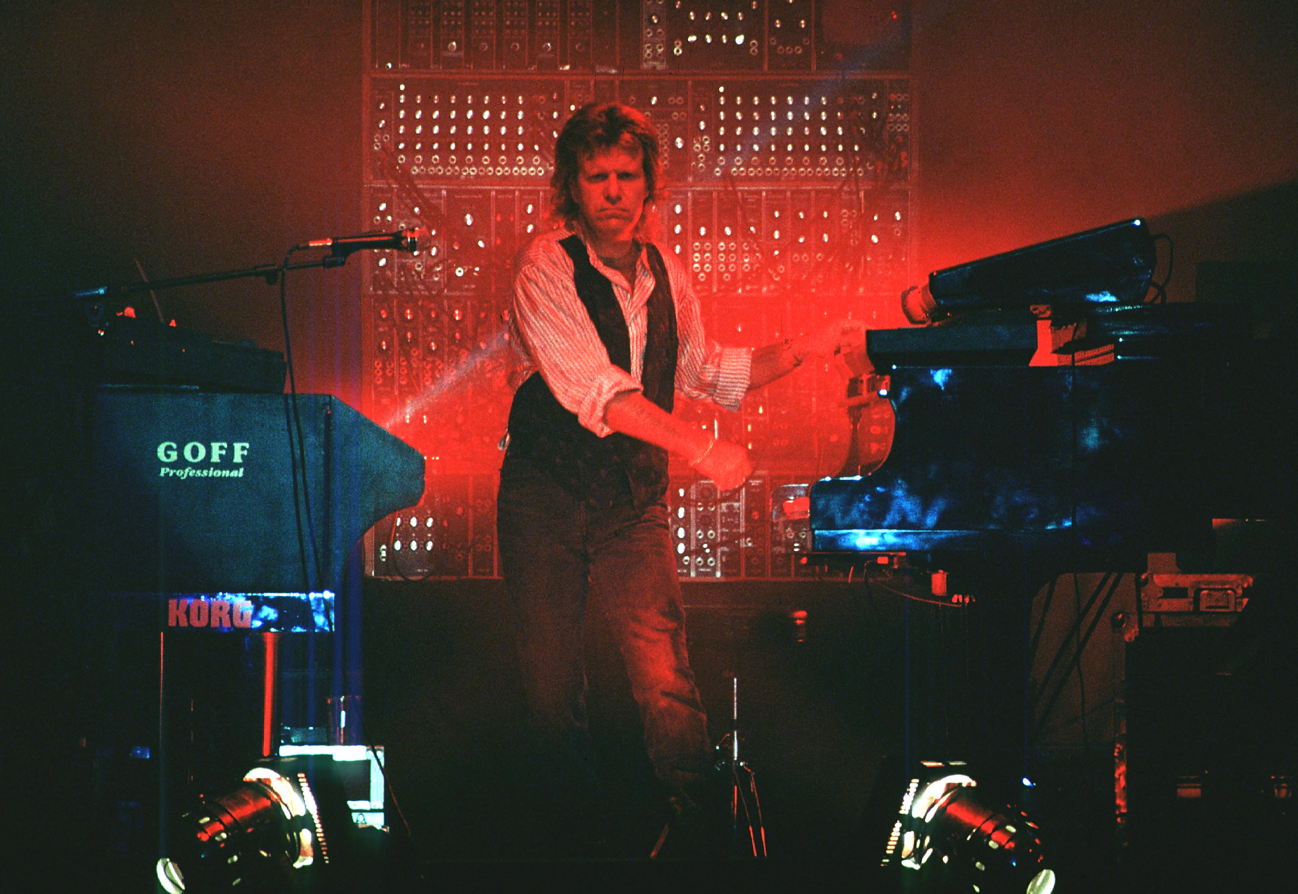 Keith Emerson del gruppo progressive-rock Emerson, Lake & Palmer in concerto nel 1992